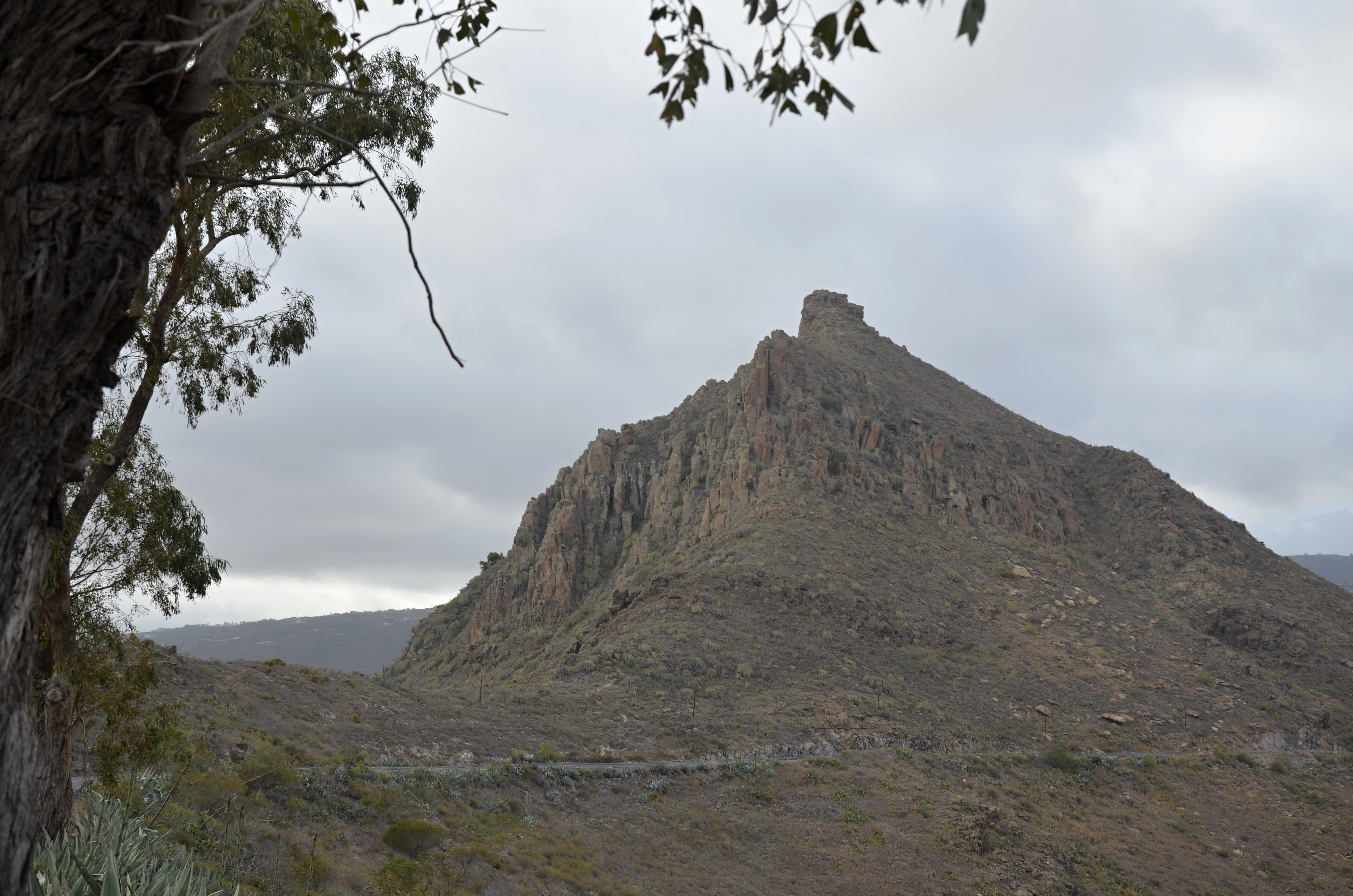 Roque de Jama This is a photography of a Special Area of Conservation in Spain with the ID: ES7020061. Natura2000 entry, EEA entry